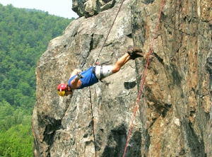 Descente en falaise d'un décaladeur